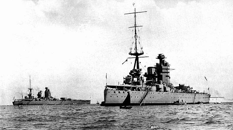 A brit HMS Nelson és HMS Rodney csatahajók.